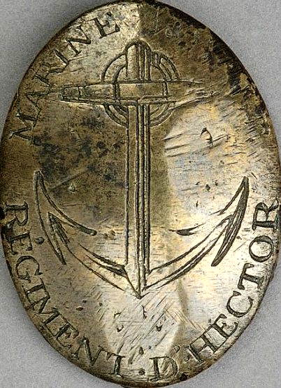 Marine nationale française. Période révolutionnaire. Plaque de soldat. Marine, régiment d'Hector. Armée catholique et royale. Guerre de Vendée.